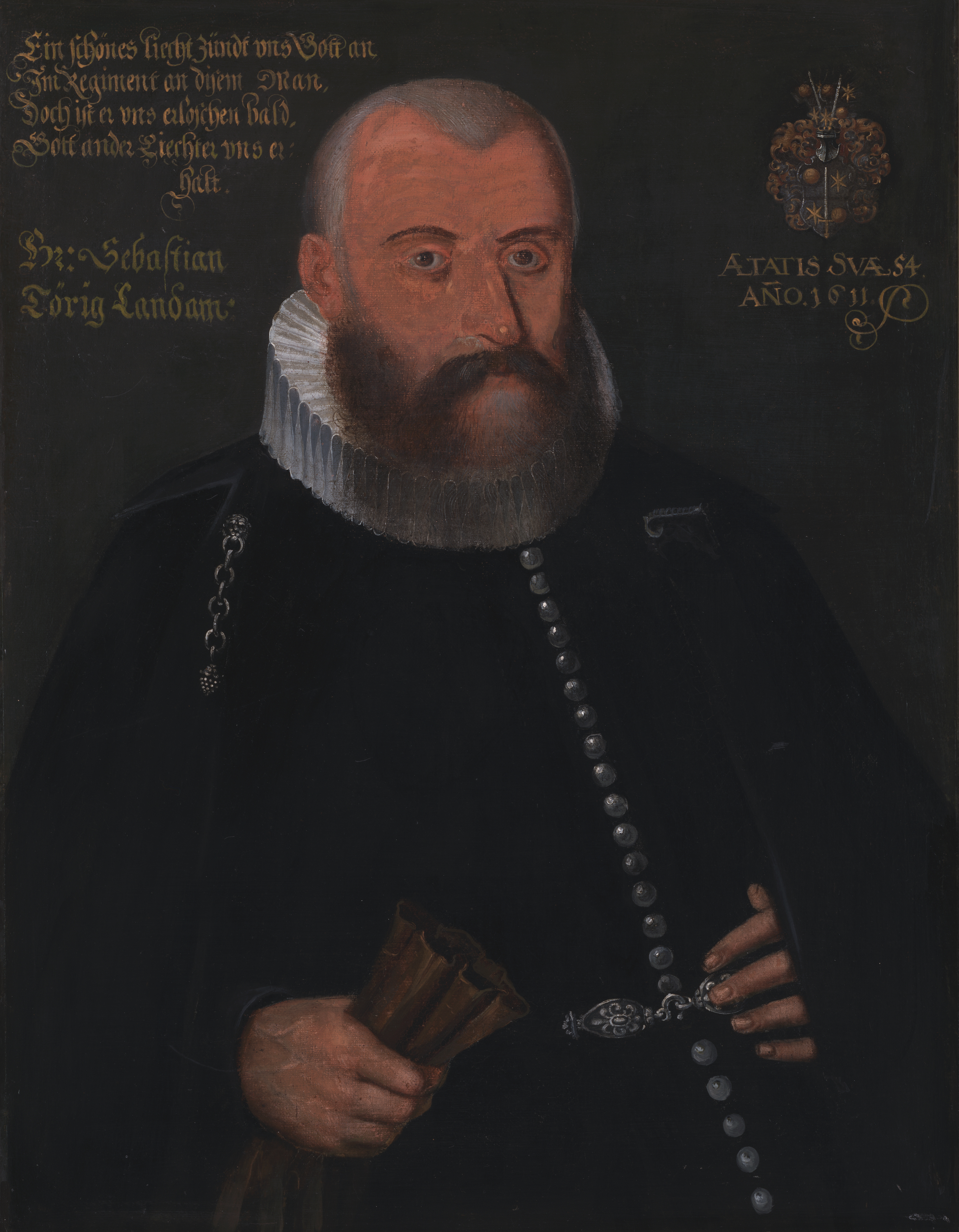 2. Landammann von Appenzell Ausserrhoden, Brustbildnis